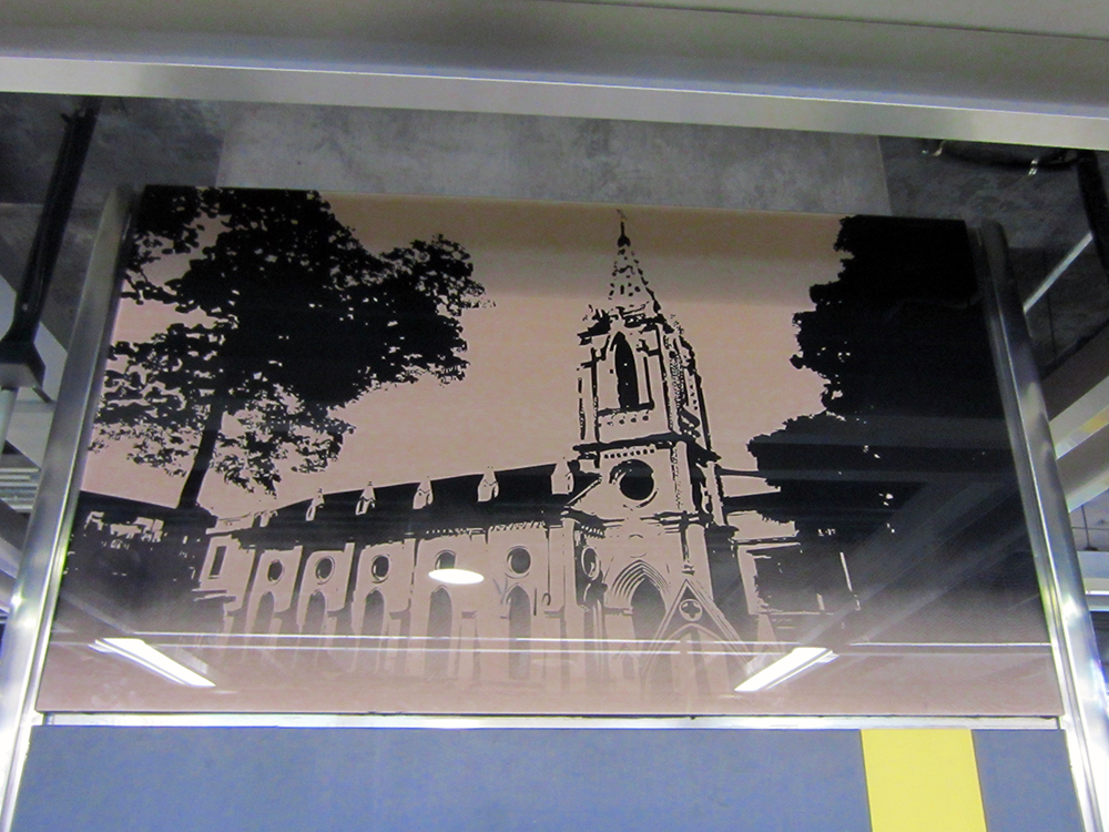 黃沙站柱面裝飾